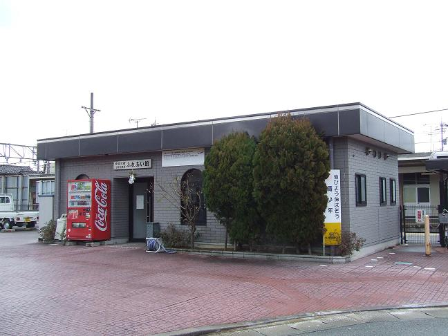 JR宇野気駅裏口駅舎